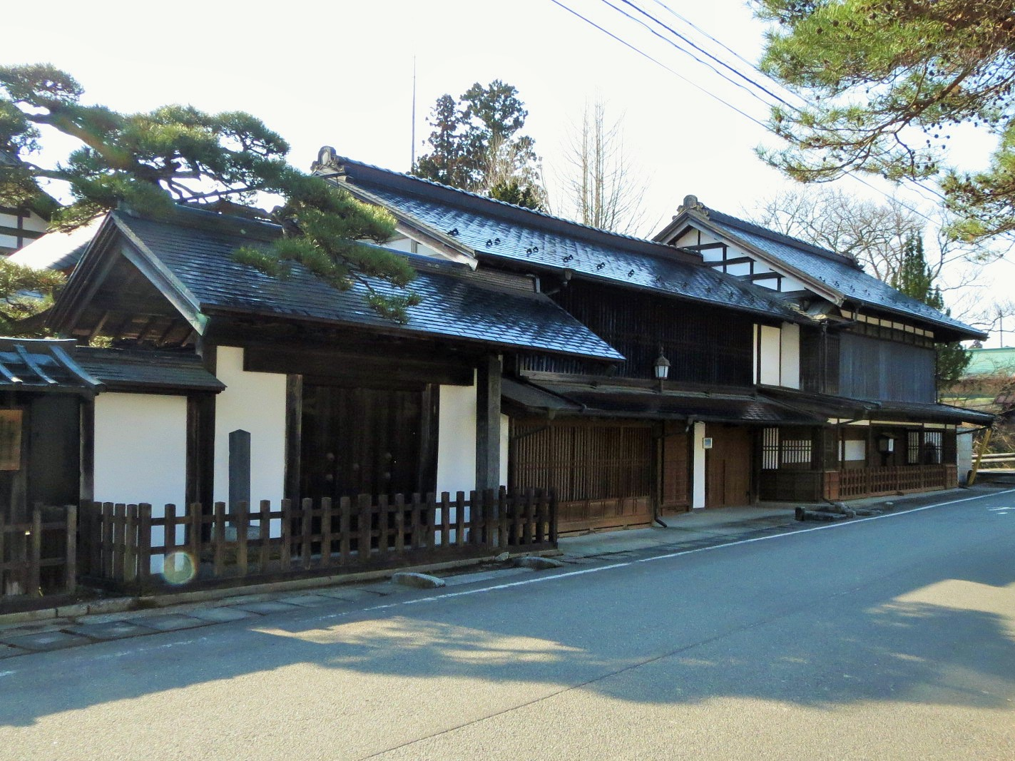 栗原市にある旧有壁宿本陣 Canon IXY 3